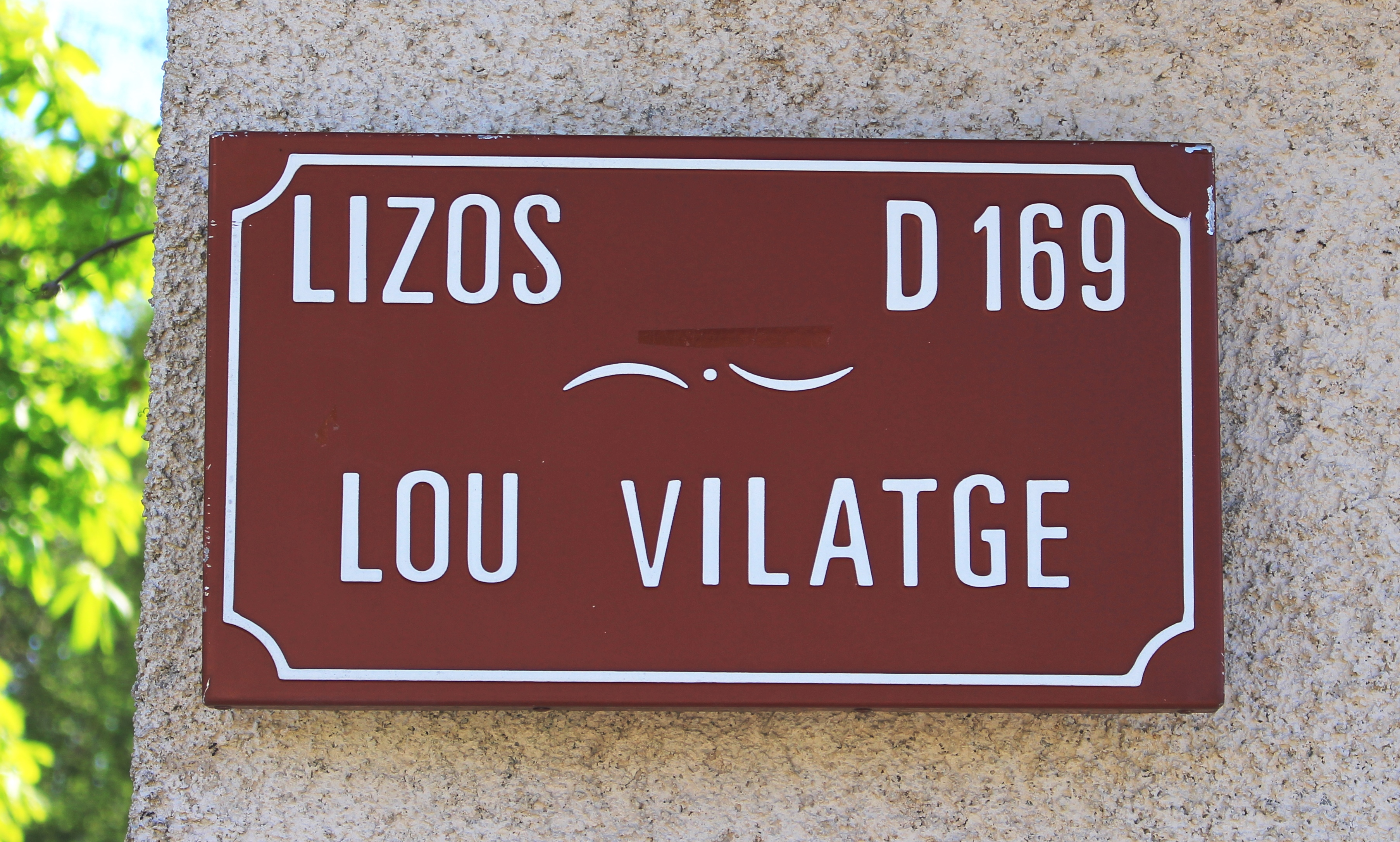 Rue du village de Lizos (Hautes-Pyrénées)